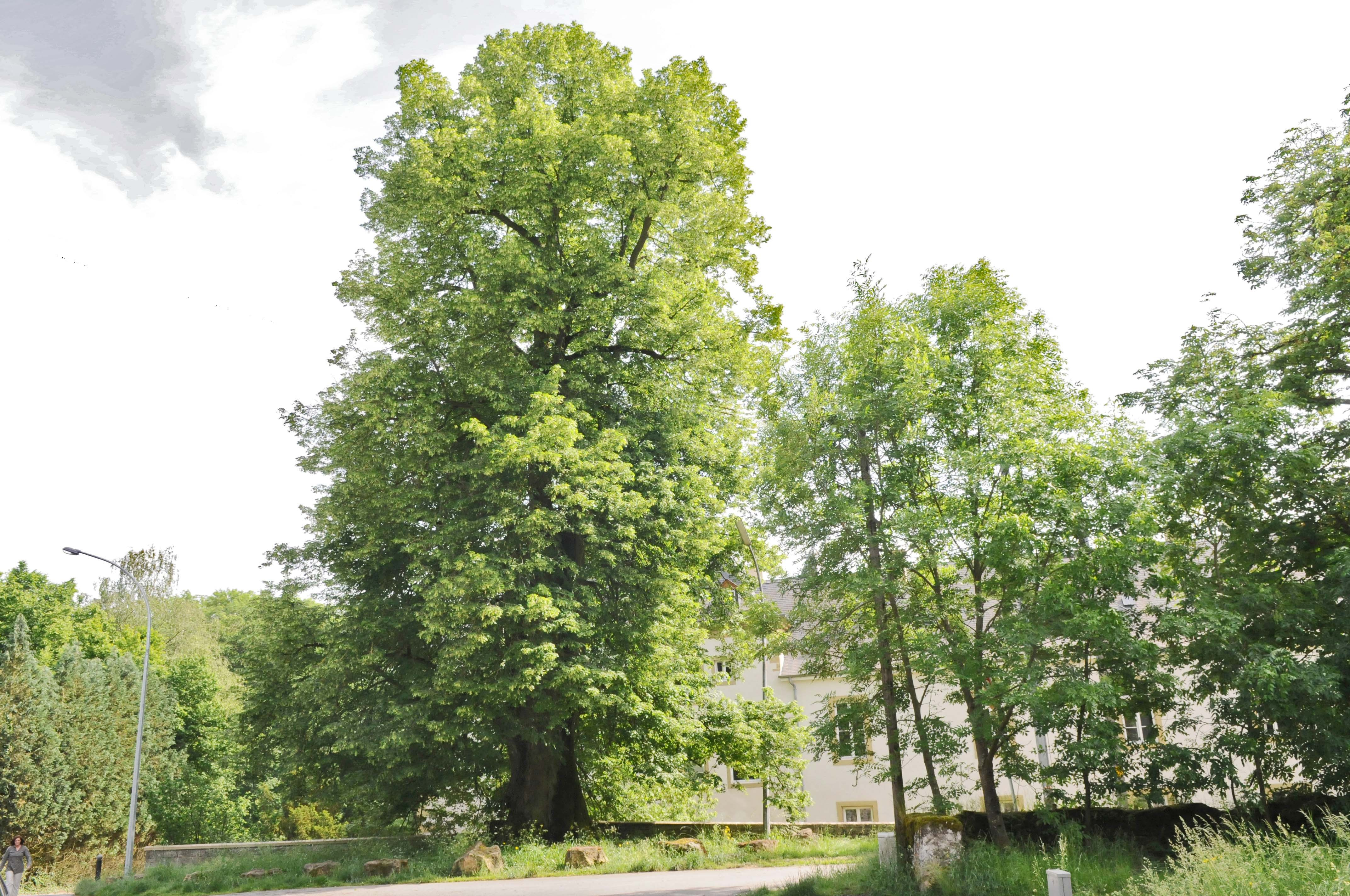 Lann zu Suessem. Suessem + Kategorie:Gemeng Suessem